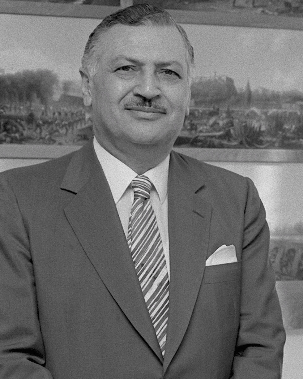 Secretary of Defense Caspar W. Weinberger poses with President Amin Gemayel and Prime Minister Shafig Wazzan (in the photo) of Lebanon in the Pentagon, Room 3E912. (Bildausschnitt)